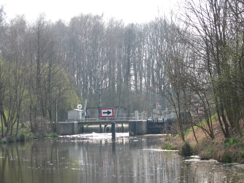 Schleuse bei Mittenwalde